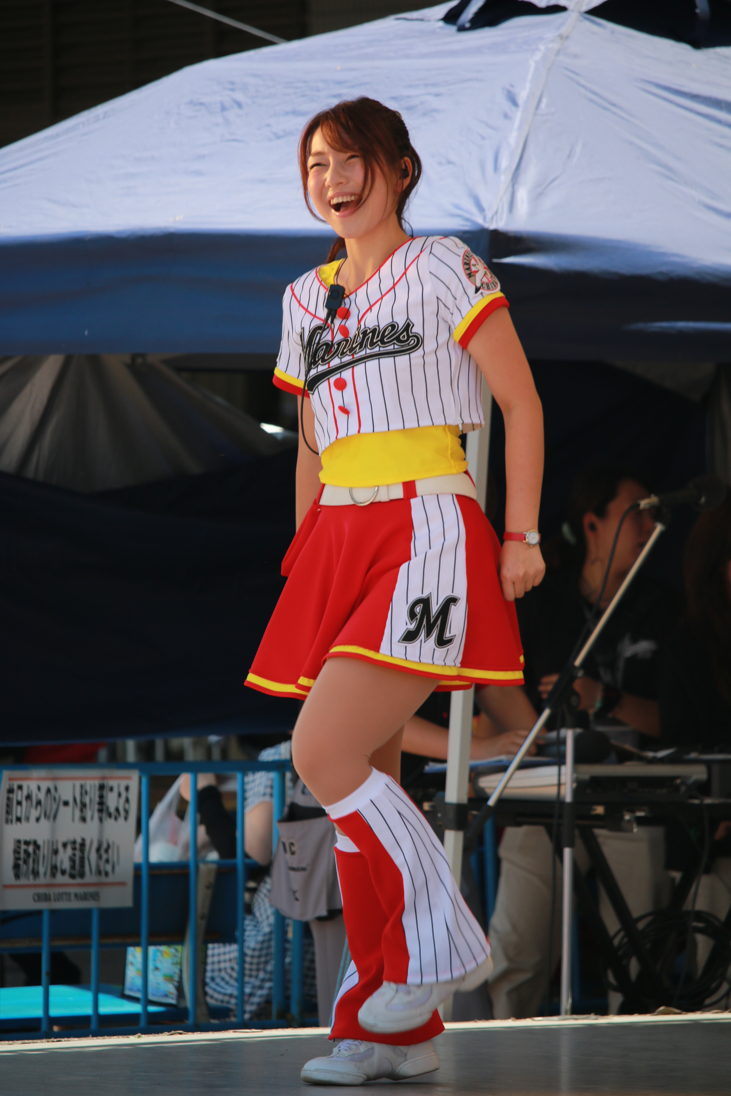 庄司こなつ 2014年6月14日 QVCマリンフィールドにて